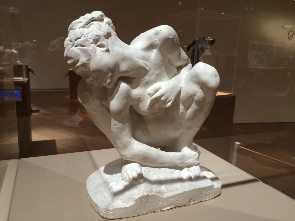 Mujer en cuclillas de Auguste Rodin.